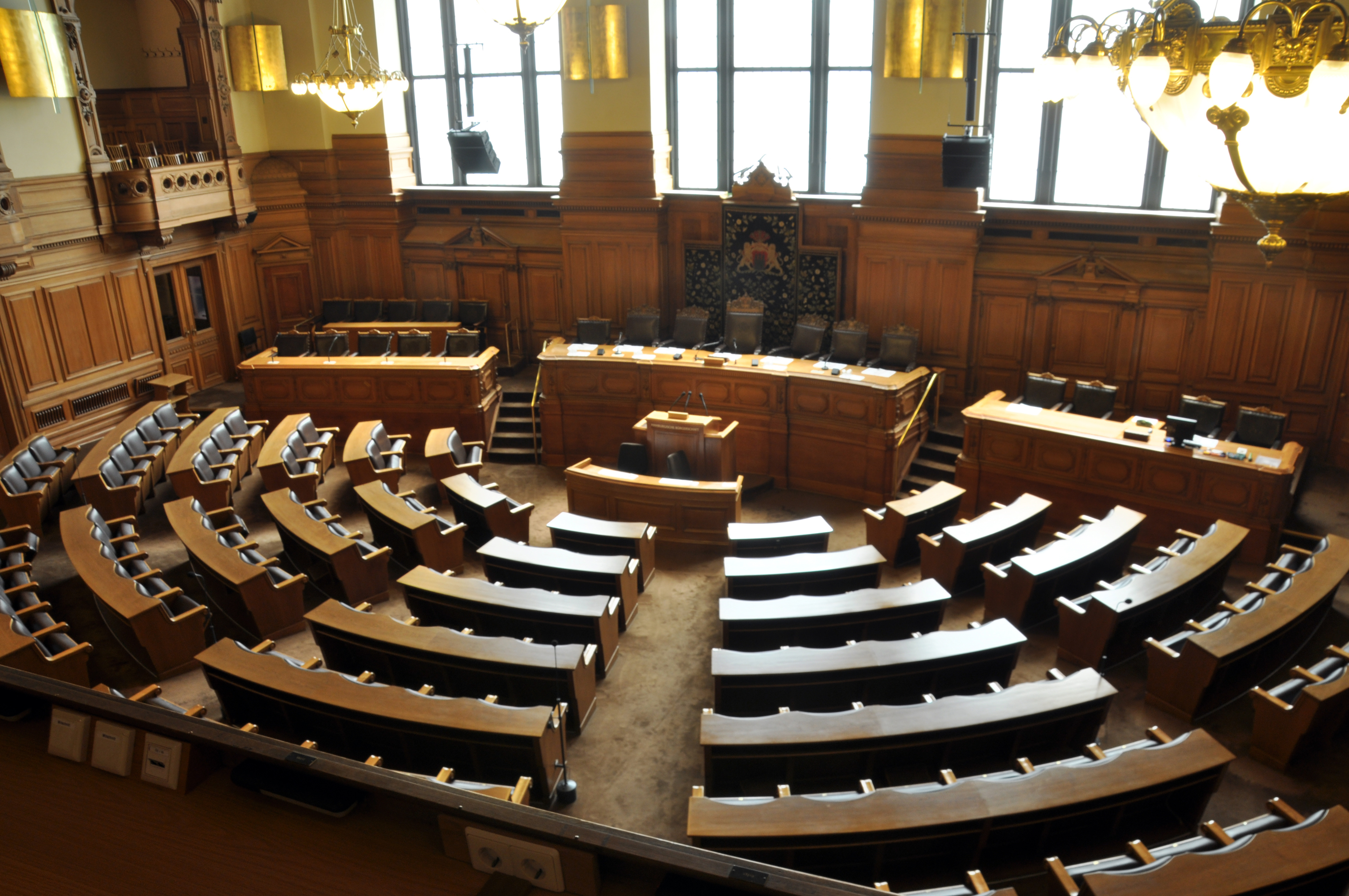 WikiProjekt Hamburgische Bürgerschaft 22./23. 6. 2011 Fotos aus dem Rathaus This is a photograph of an architectural monument.